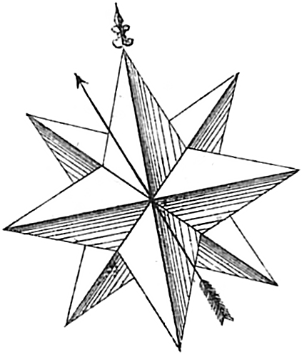 Windrose mit Deklinationsnadel von der Insel Neuwerk 1826.